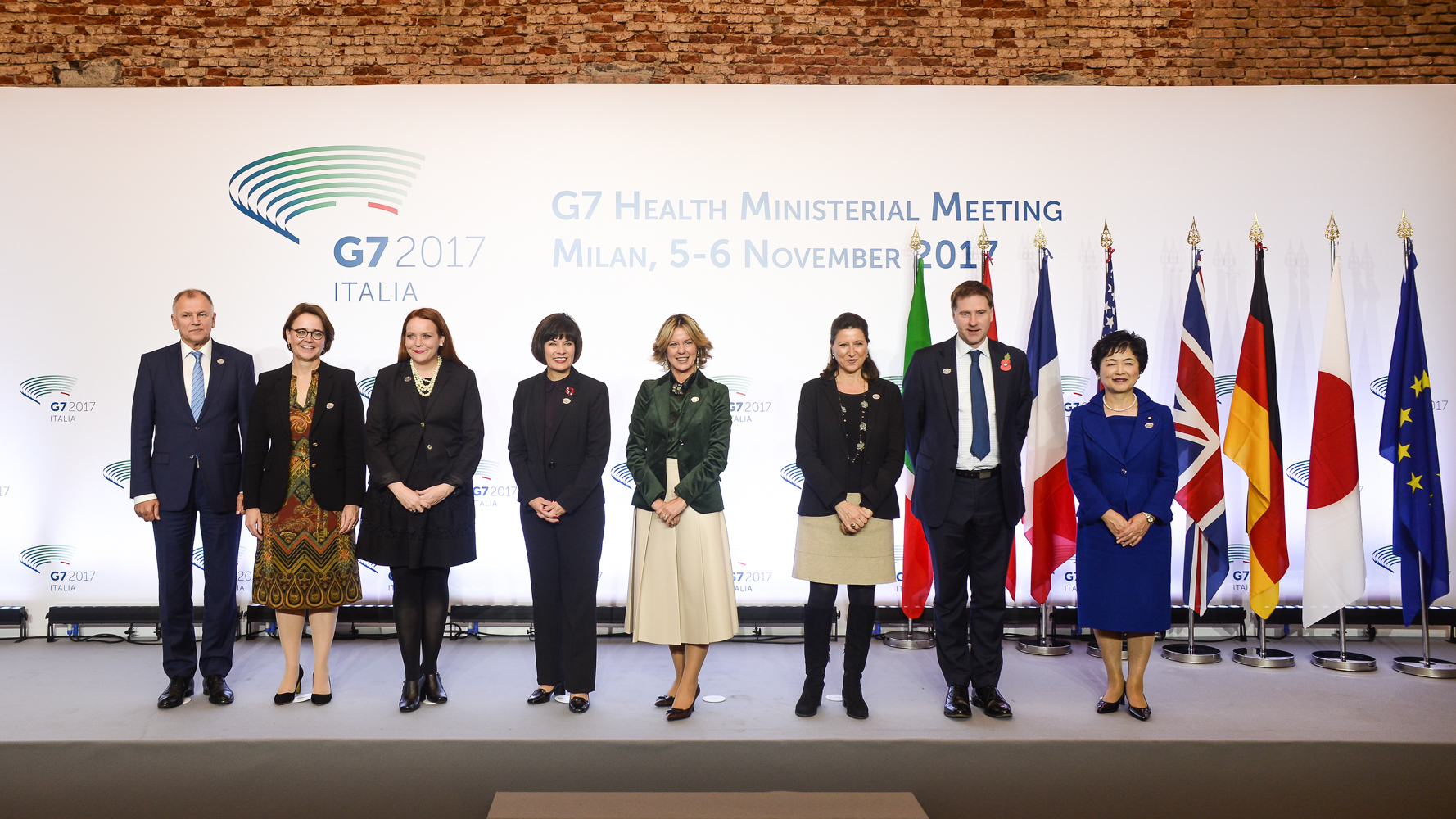 Foto di gruppo dei partecipanti al G7 Salute di Milano